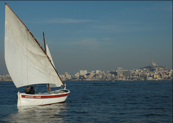 Photo de la barquette marseillaise André Jean restaurée et entretenue par l'association La Nave Va. Cette embarcation est dotée de la voile latine, gréement traditionnel des bateaux méditerranéens.